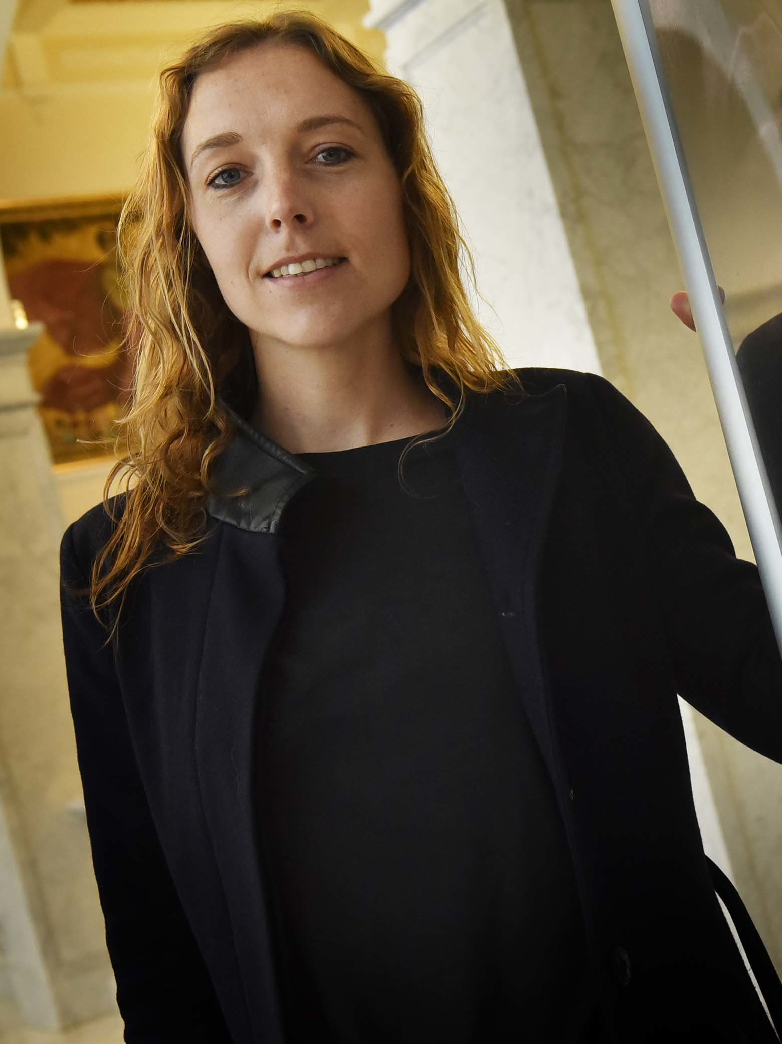 A Haunting History Fotografía: Iñigo Royo